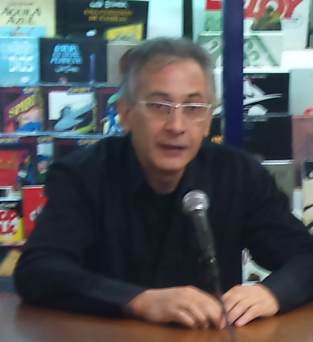 L'editor català Joan Navarro i Badia, responsable de l'editorial dedicada al còmic EDT.